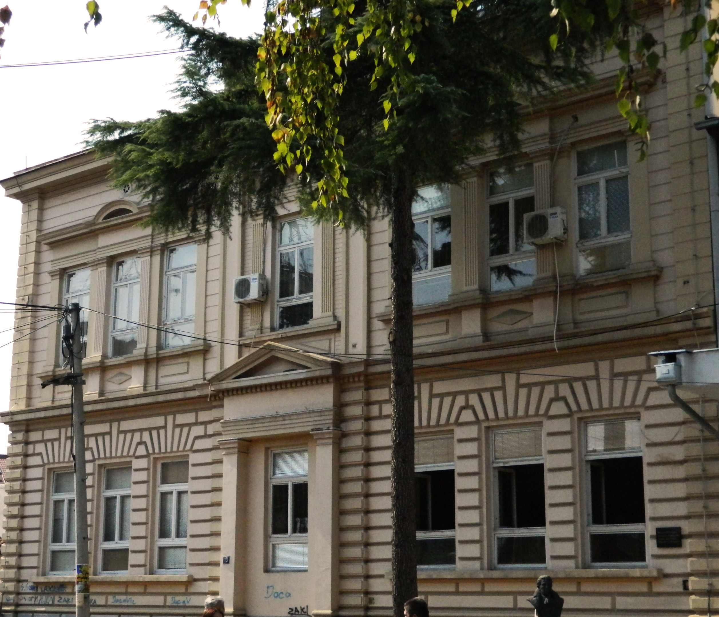 zadužbina Milovana Gušića